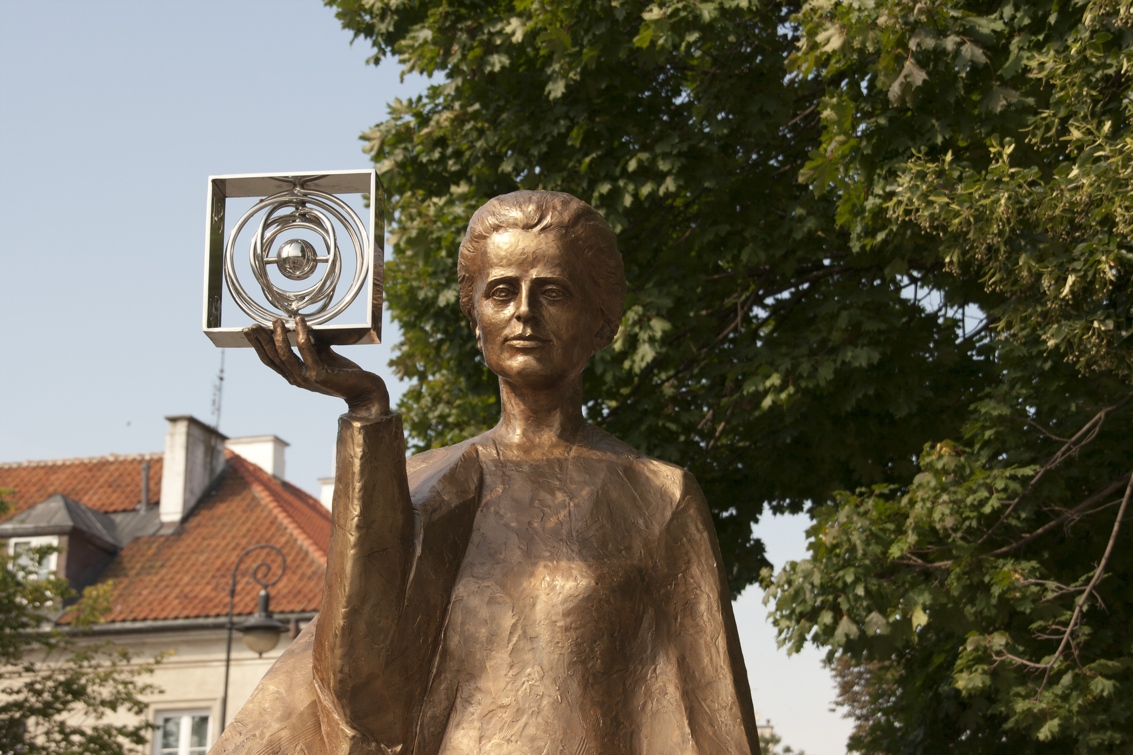 Pomnik Marii Skłodowskiej-Curie w Warszawie. Odlany z brązu. Uczona trzyma w ręce model polonu. Autorem pomnika jest rzeźbiarz Bronisław Krzysztof.